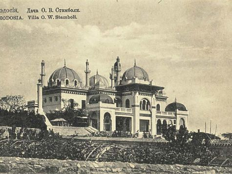 Дача Стамболи в Феодосии.